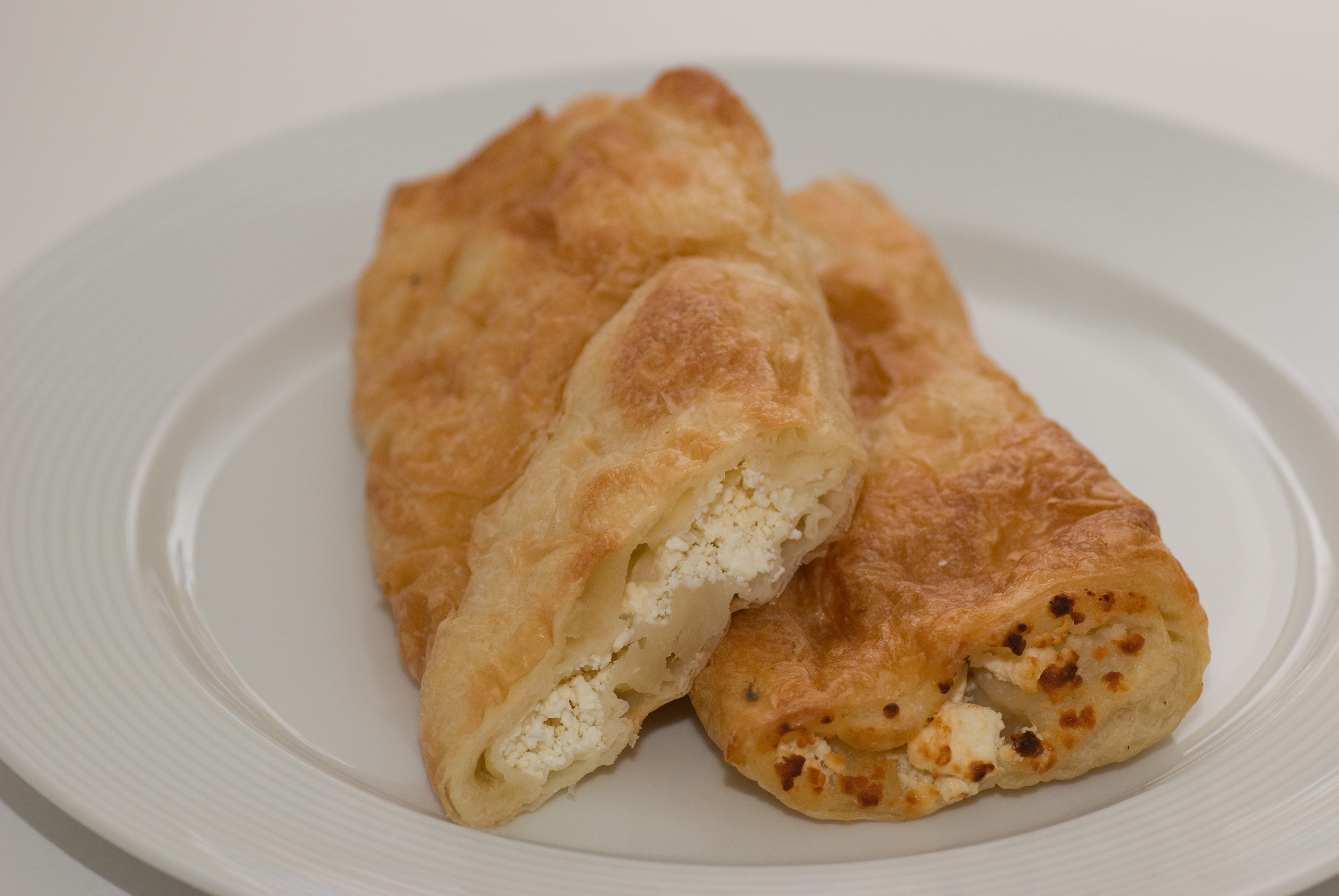 Börek mit Käse